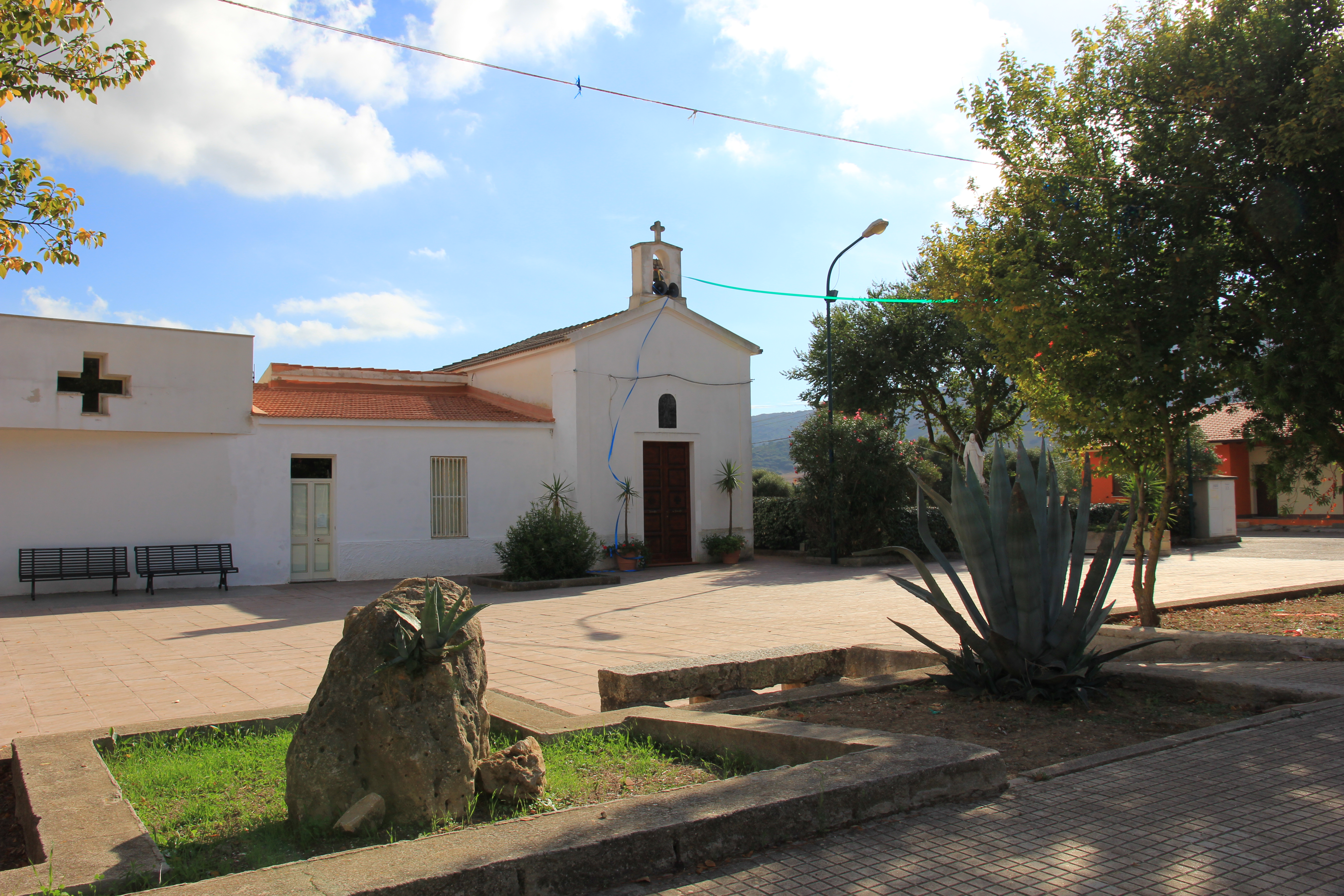 Sassari